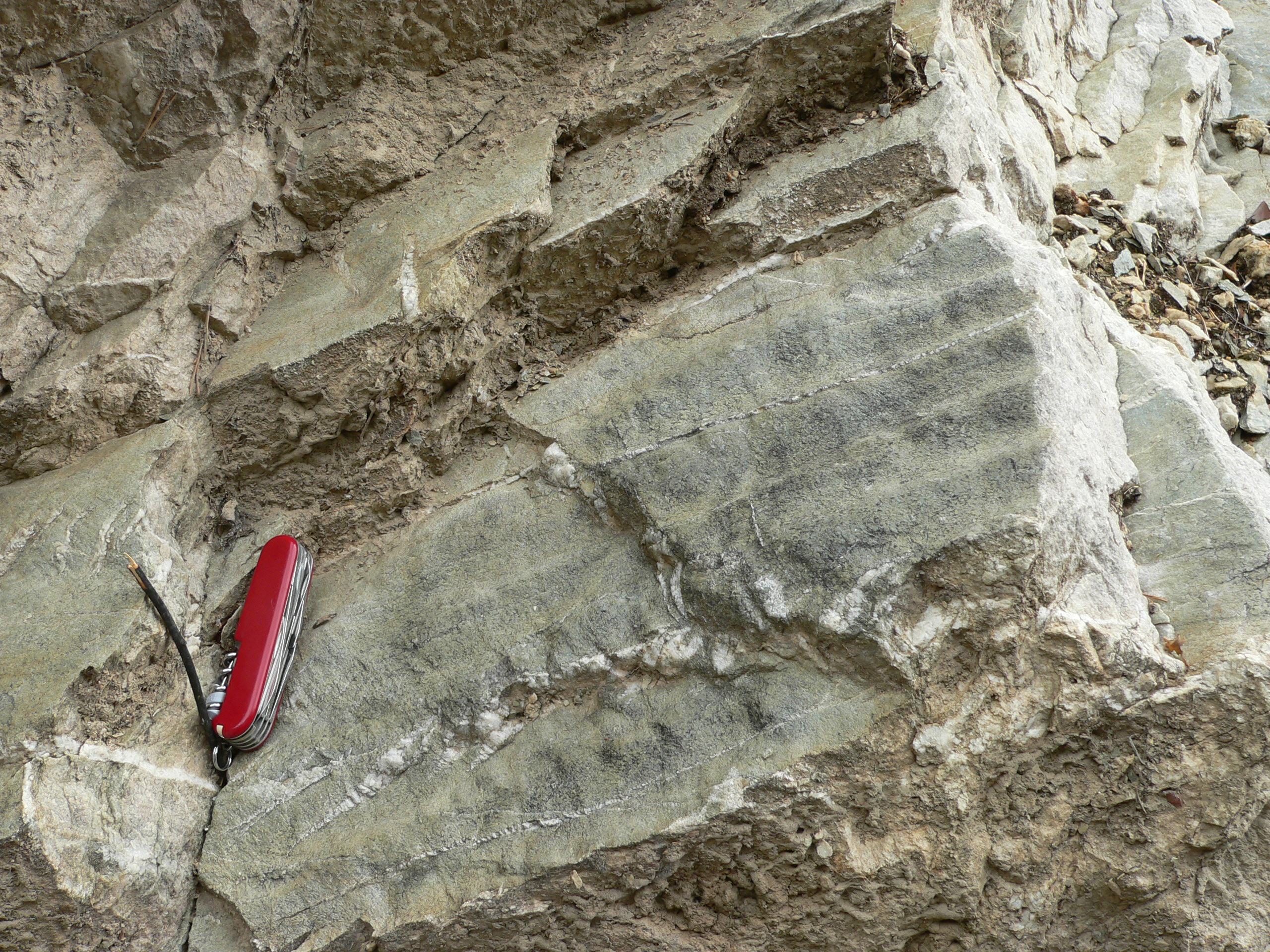 Gorges du Guil, France, Ripplemarks of Quartzite